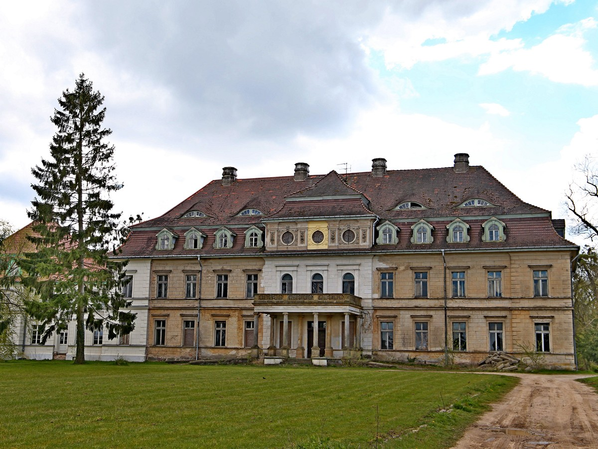 Probeanstrich von Schloss Vollrathsruhe in Mecklenburg